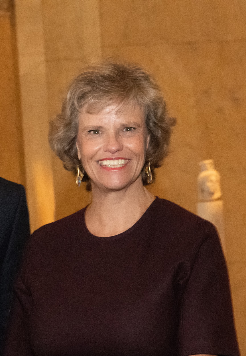 Antiker Kopf und zwei Statuetten aus der römischen Kaiserzeit an Kunsthistorisches Museum Wien übergeben. Im Bild: Finanzminister Hartwig Löger und Sabine Haag, Generaldirektorin des Kunsthistorischen Museums Wien. Fotocredit: BMF/Wilke